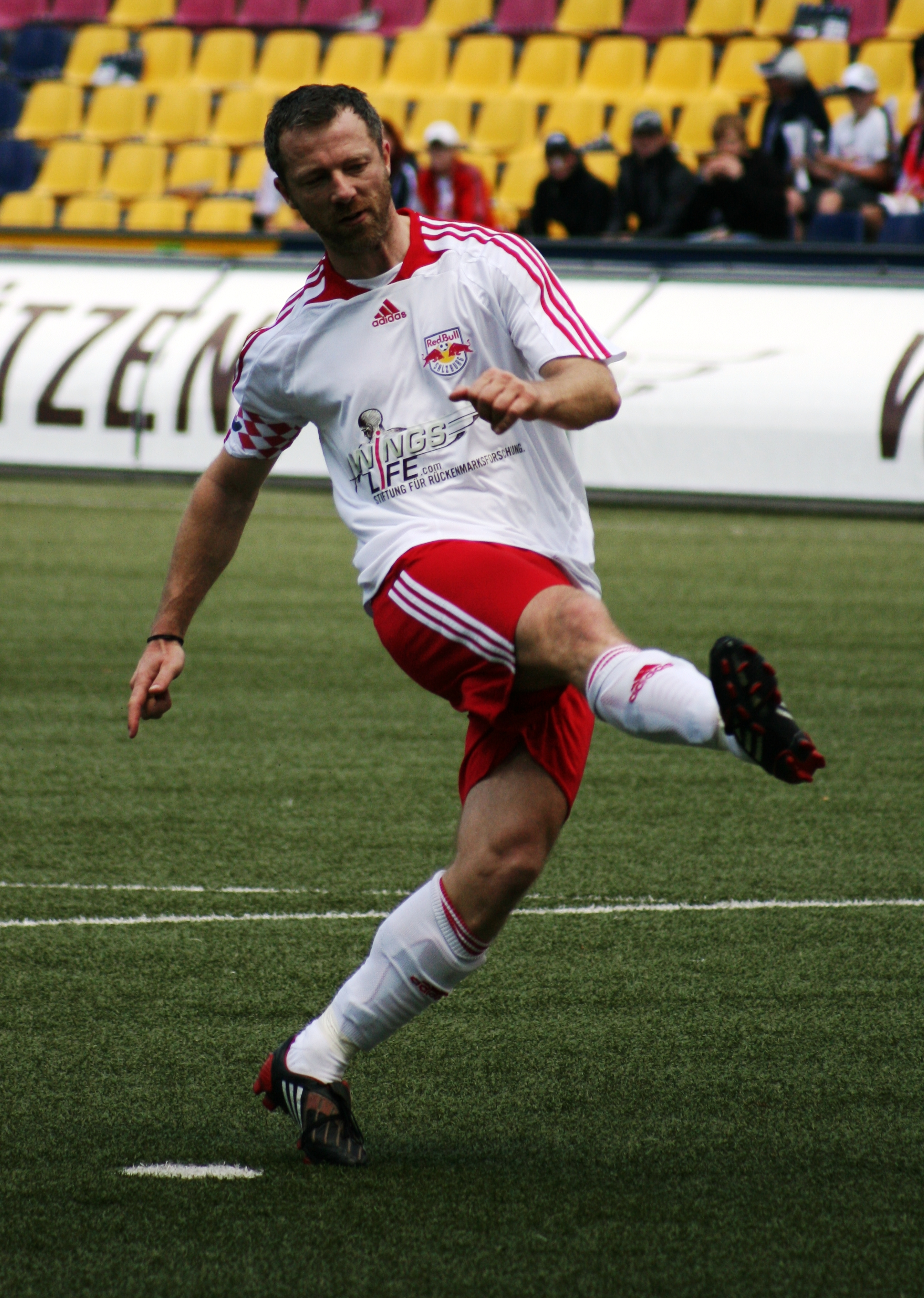 Thomas Linke bei einem Benefizspiel